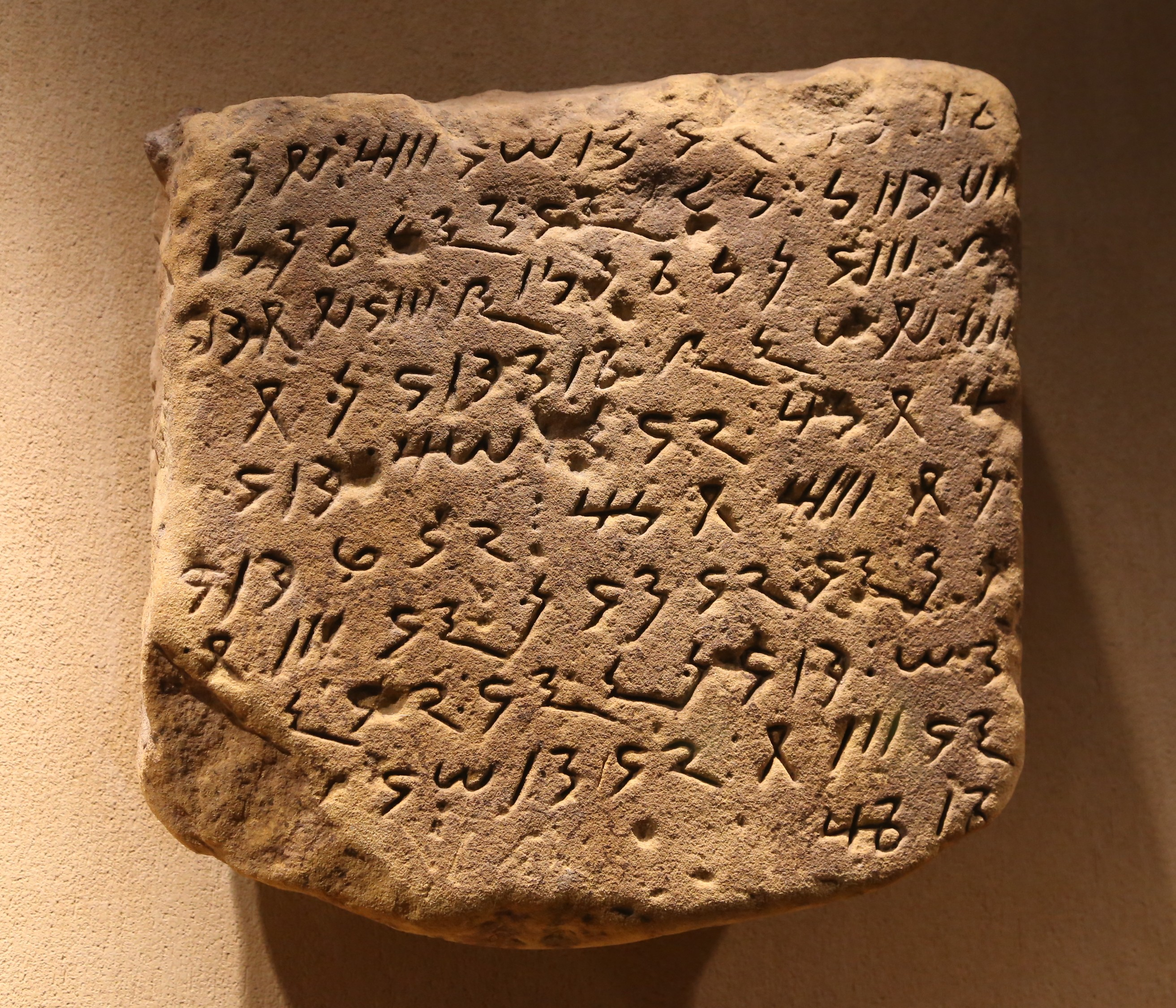 Meroitische Inschrift, Meroe, 1. Jh. n. Chr., Sandstein